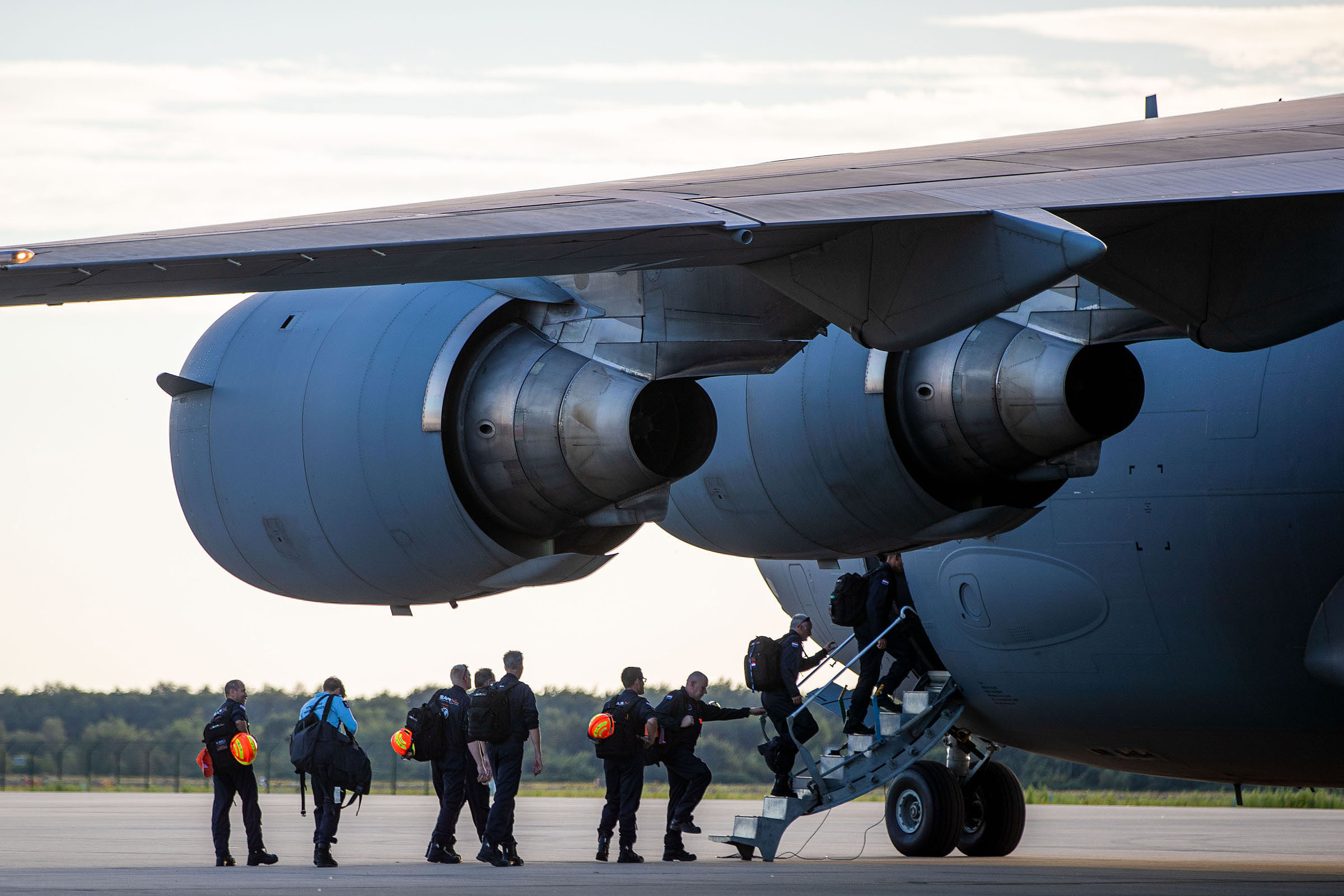 Het zogenoemd Urban Search and Rescue (USAR)-team gaat vanavond vanaf Vliegbasis Eindhoven naar Beiroet. Gisteren werd de Libanese hoofdstad getroffen door een zware explosie. Het meer dan 60 koppige zoek- en reddingsteam is gespecialiseerd in het zoeken naar vermisten en bestaat uit brandweerlieden, politie, artsen en militairen.